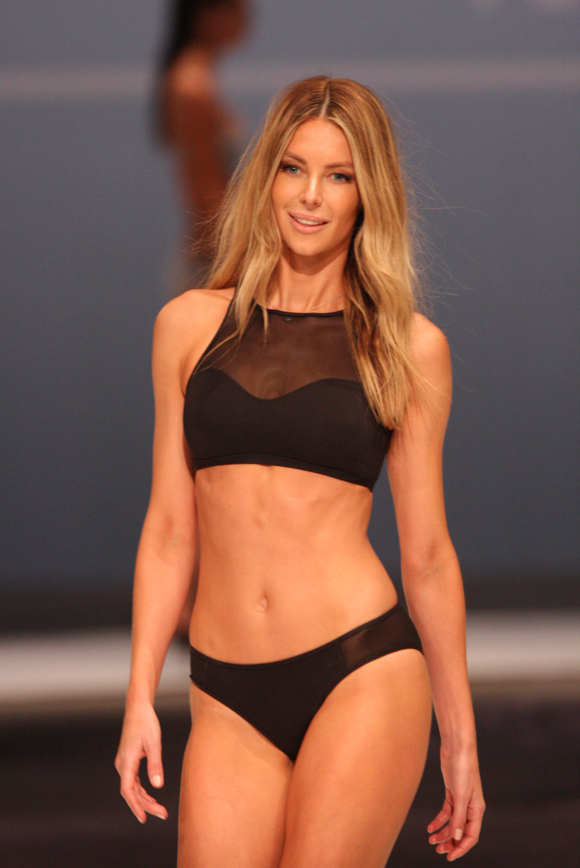 Myer Spring Launch